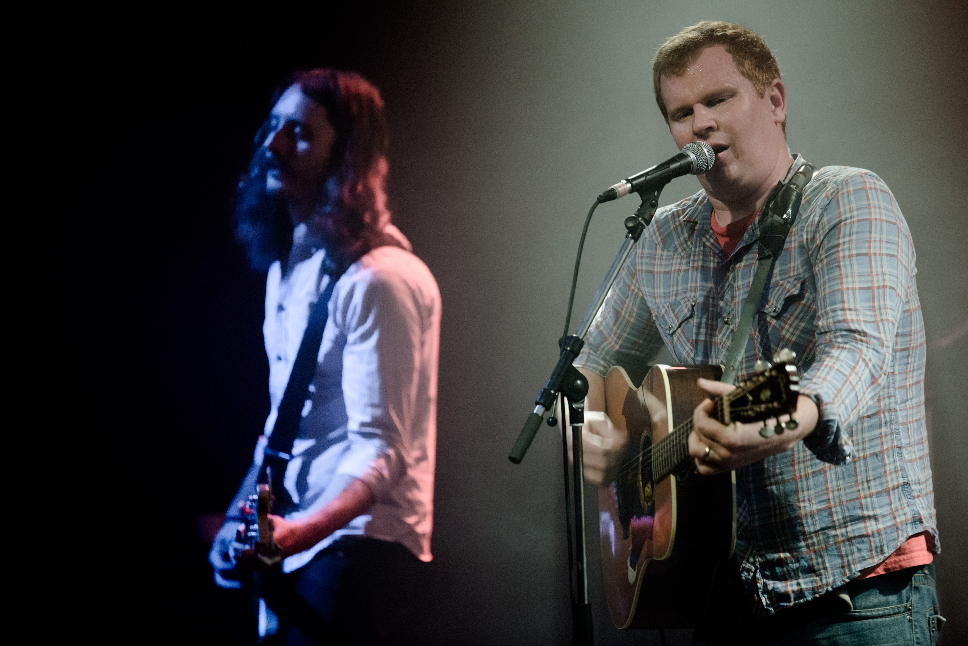 de The Builders and Butchers 2014 Muenchen Kranhalle